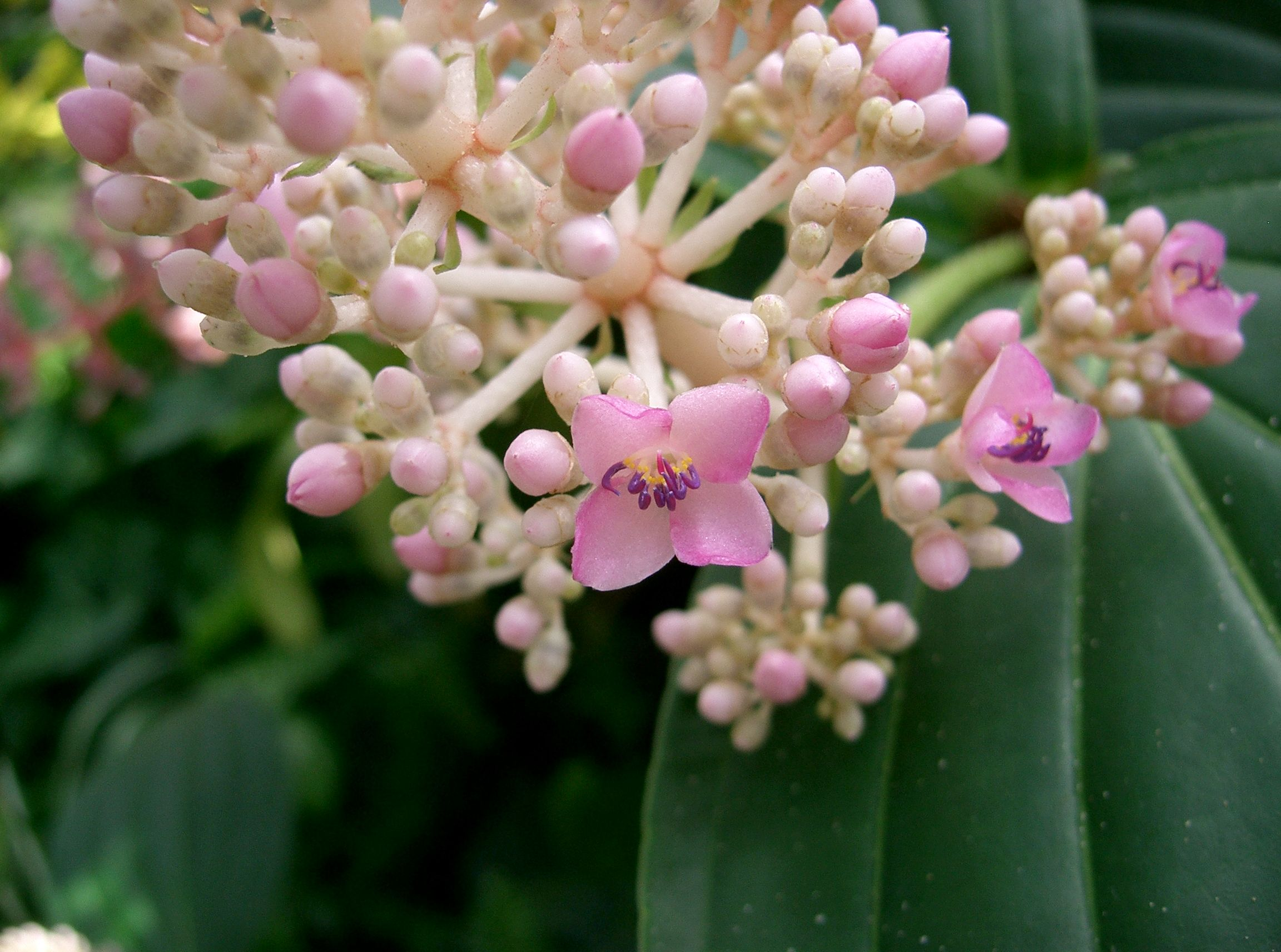 Scientific name Medinilla speciosa Place:Osaka-fu Japan